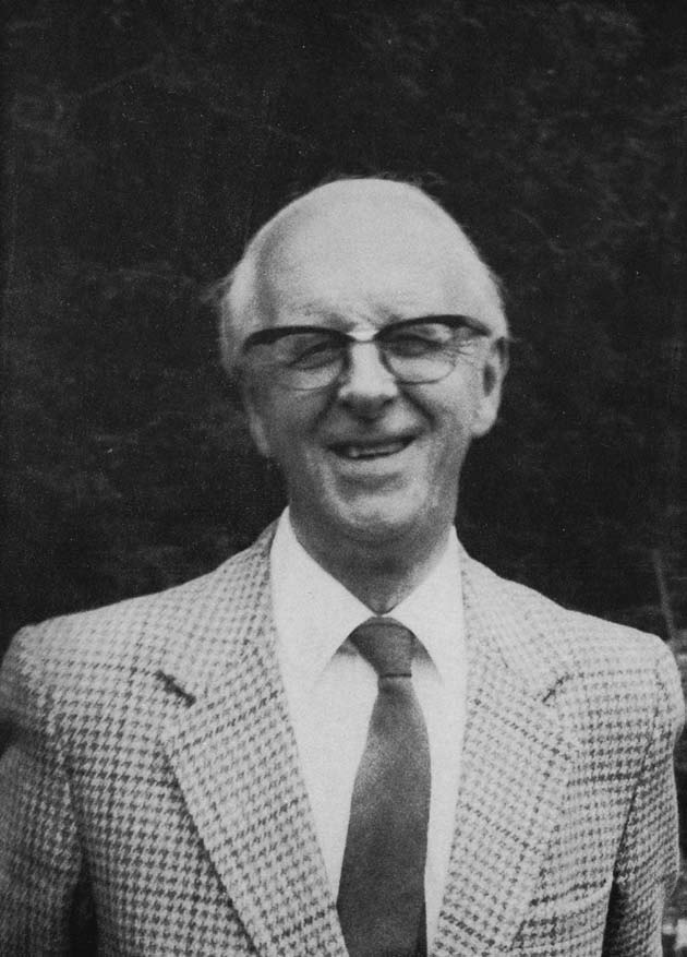 Foto van Frank William Walbank (1909-2008). Foto afkomstig uit Levensberichten en herdenkingen 2010 van de Koninklijke Nederlandse Akademie van Wetenschappen (Amsterdam, 2010).